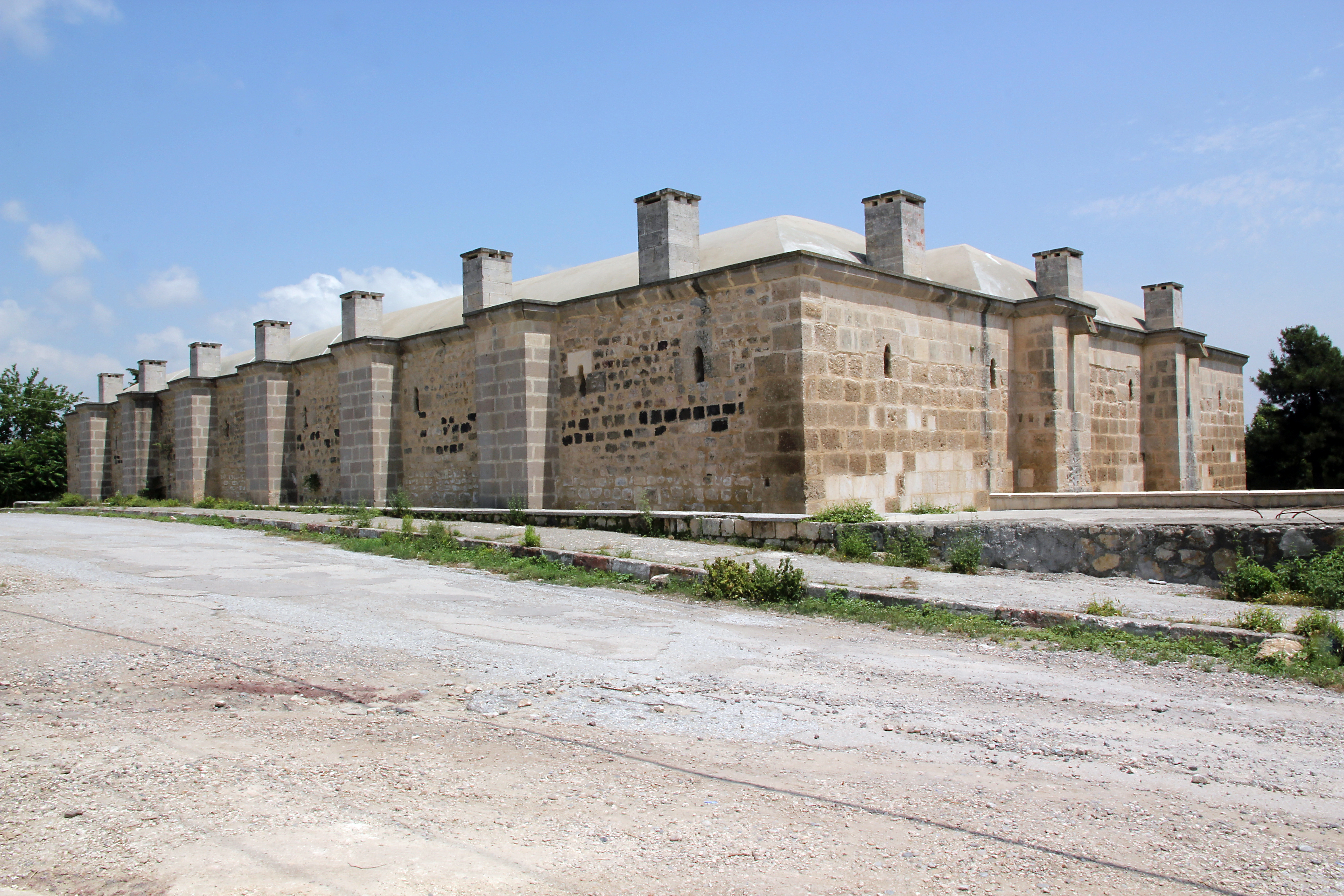 Kurtkulağı Kervansaray im gleichnamigen Ort in der Cukurovaebene, Südtürkei